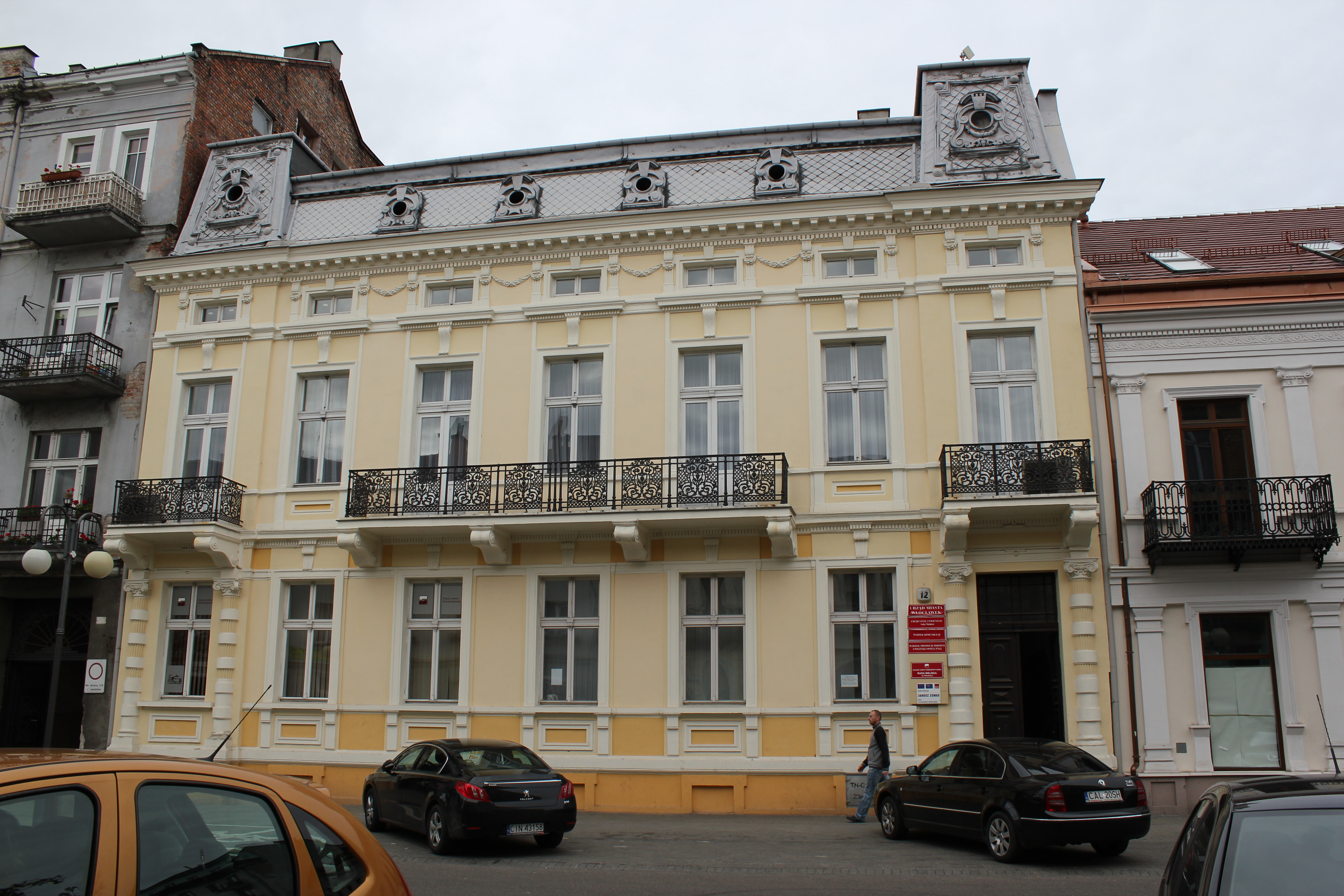 kamienica, tzw. pałac Kühna z oficynami, 1881-1884 Włocławek, ul. Kościuszki 12, miasto Włocławek